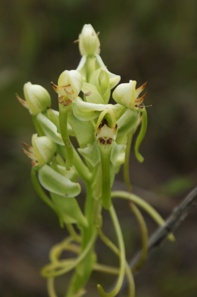 Habenaria hamata - ORCHIDACEAE Parque Nacional da Chapada dos Veadeiros - Cavalcante - Goiás - Brasil.